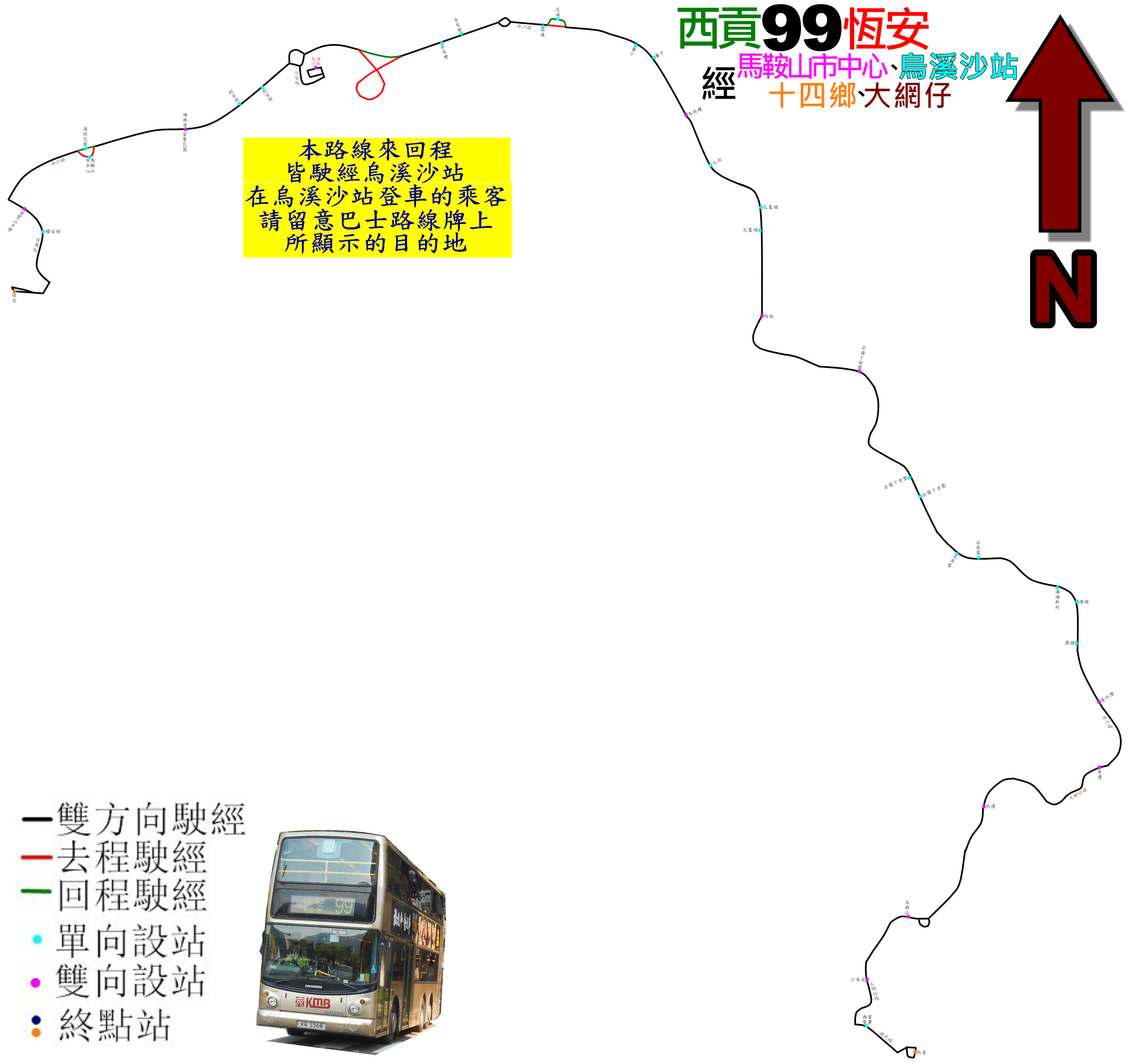 中文（香港）: 九巴99線的走線圖